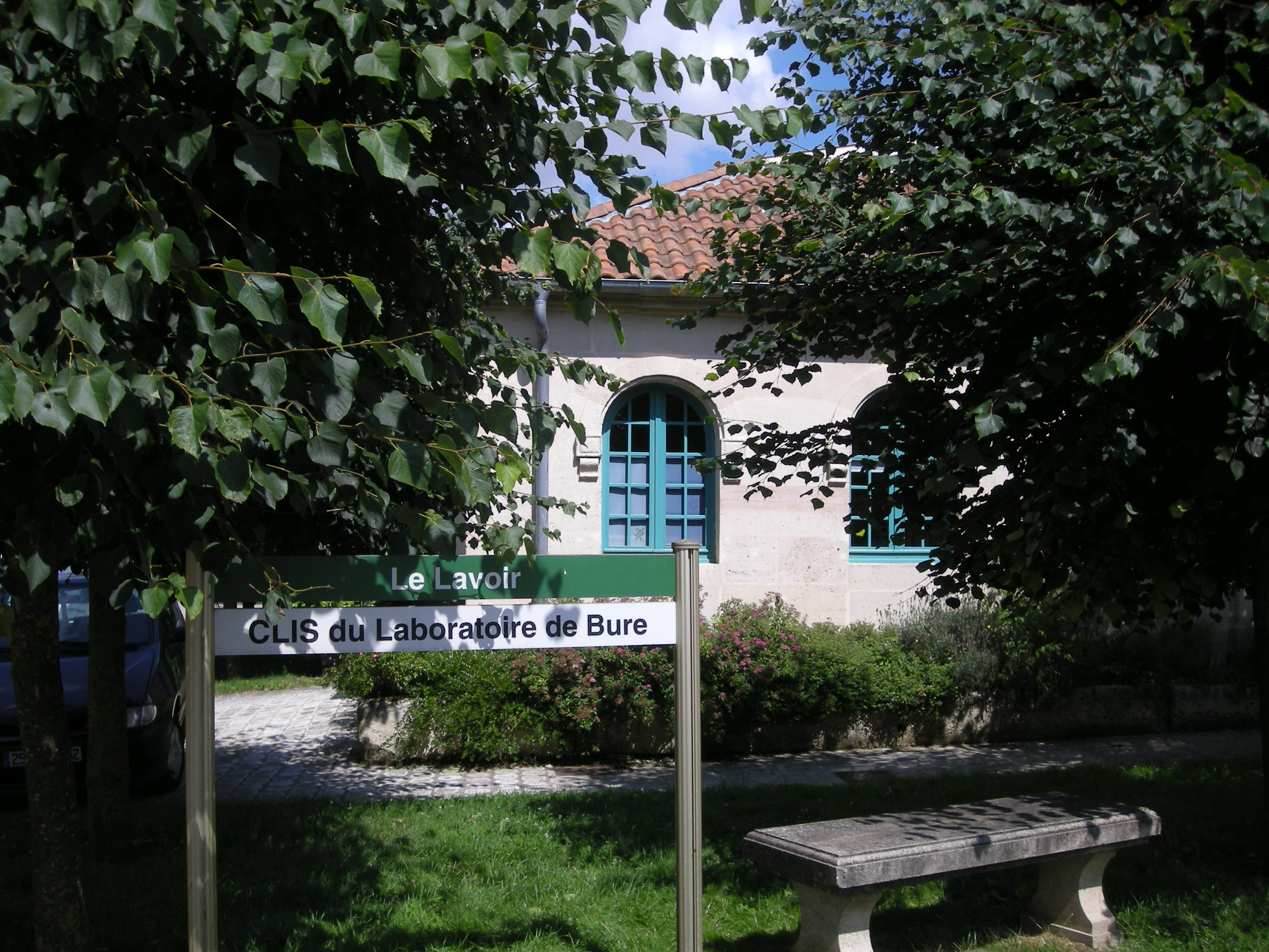 Comité local d'information et de suivi (CLIS) dfu laboratoire de recherche souterrain de Bure (Meuse), installé dans le lavoir du village